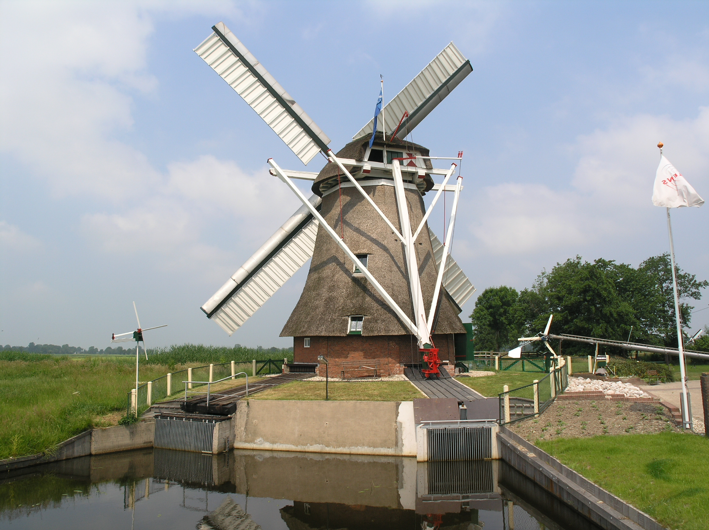 Sebaldeburen Poldermolen De Eendracht